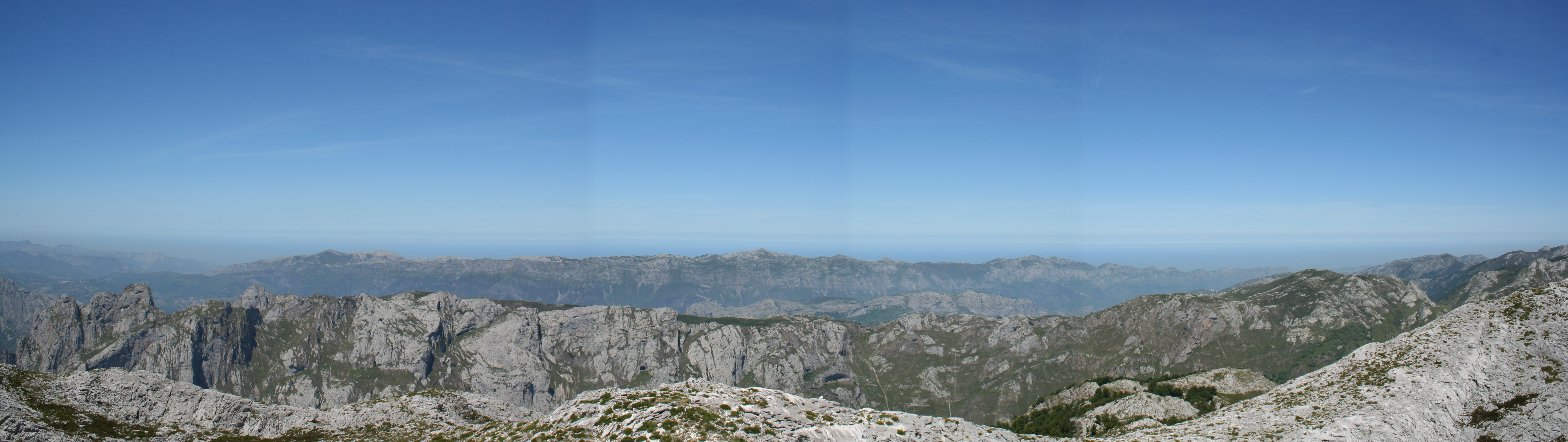 Sierra del Cuera vista desde Peña Maín en Asturias